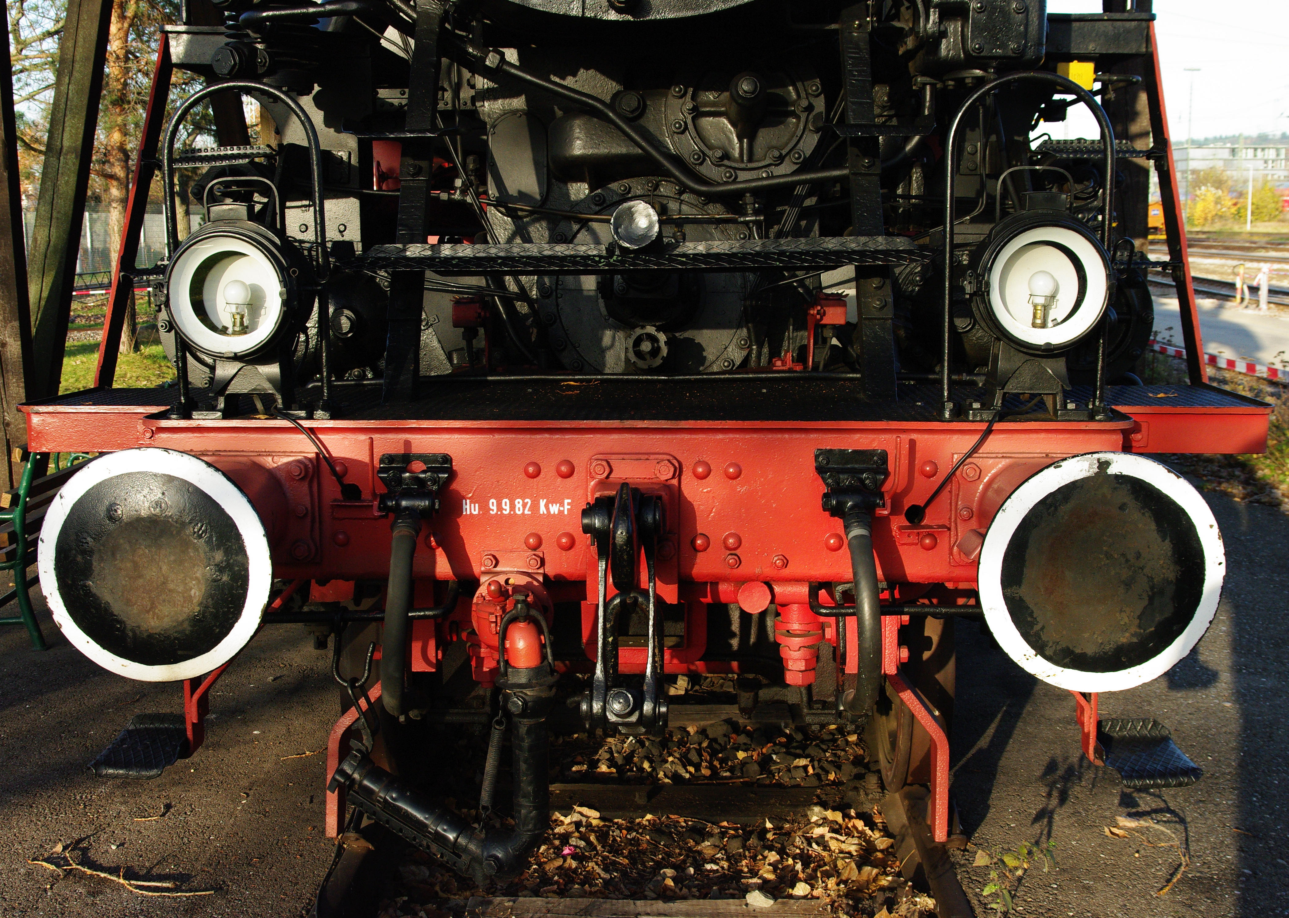 Bilder der Lokomotive 007 Baureihe 85 die im Besitz der Stadt Freiburg und auf der Höllentalbahn gefahren ist